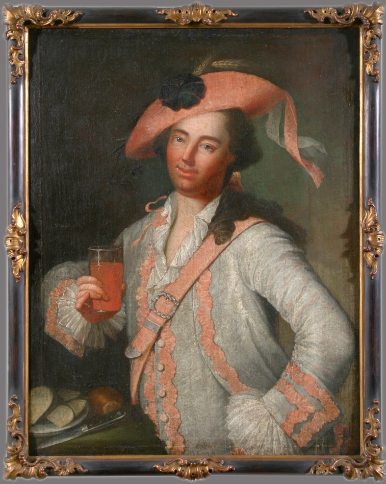 Gemälde des Fränkischen Museums in Feuchtwangen: Der Markgraf von Brandenburg-Ansbach Carl Wilhelm Friedrich (1712-1757), genannt der Wilde Markgraf, als Schäfer oder Schnitter kostümiert.